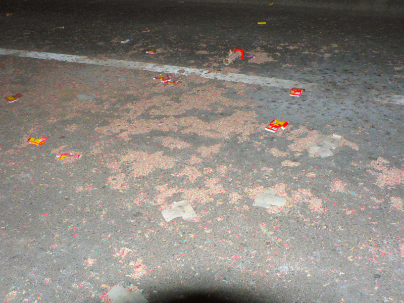 2010年の精霊流しの後の、松山町の路上。大量の爆竹が散乱している。